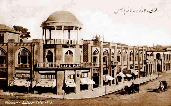 كافه پارس در خیابان لاله‌زار نو در دهه 1320